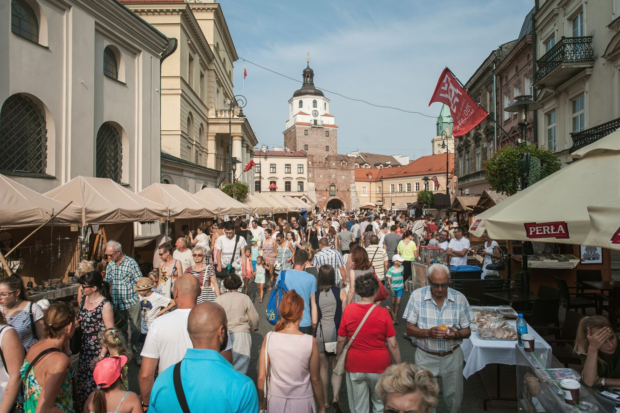 Deptak przed Bramą Krakowską w Lublinie podczas Jarmarku Jagiellońskiego fot. Marcin Pietrusza